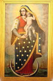 Patrona del Municipio Juan Antonio Sotillo del Estado Anzoategui